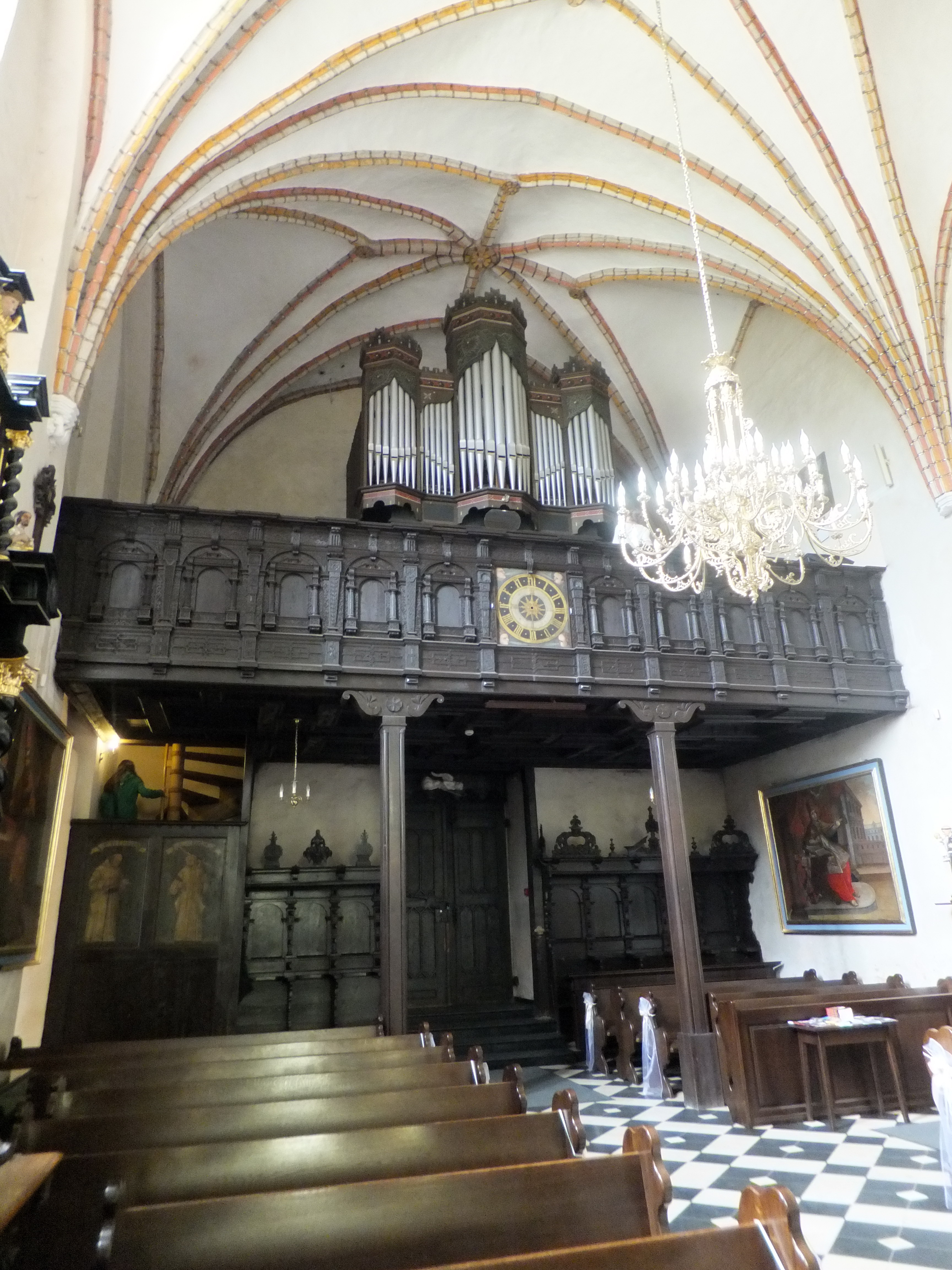 Kolegiata Wniebowzięcia Najświętszej Maryi Panny w Kartuzach - empora z prospektem organowym.